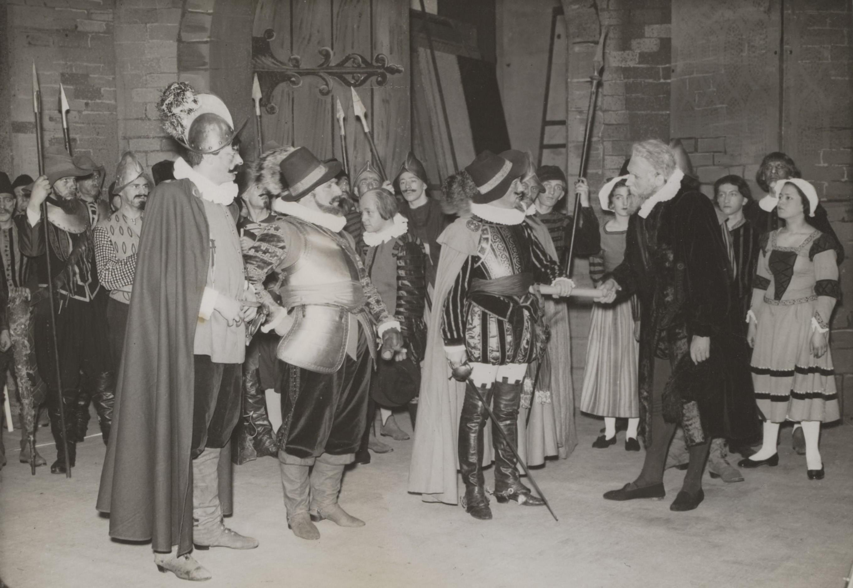 Vanaf zaterdag 19 december 1936 wordt in de Koninklijke Schouwburg te Den Haag opgevoerd het toneelstuk "Uit het leven der Oranjes", op te voeren door het Vereenigd Rotterdamsch Hofstad Tooneel. Een der scenes "de inneming van Den Briel". Vlnr Kapt. v.d. Rijk (Bob Oosthoek), Treslong (Alex Hock), Lumey (Theo Frenkel), Burgemeester Nukkel (Georg Alexander)